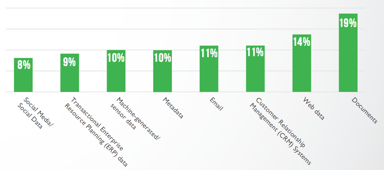 الشكل ٢: مصادر البيانات